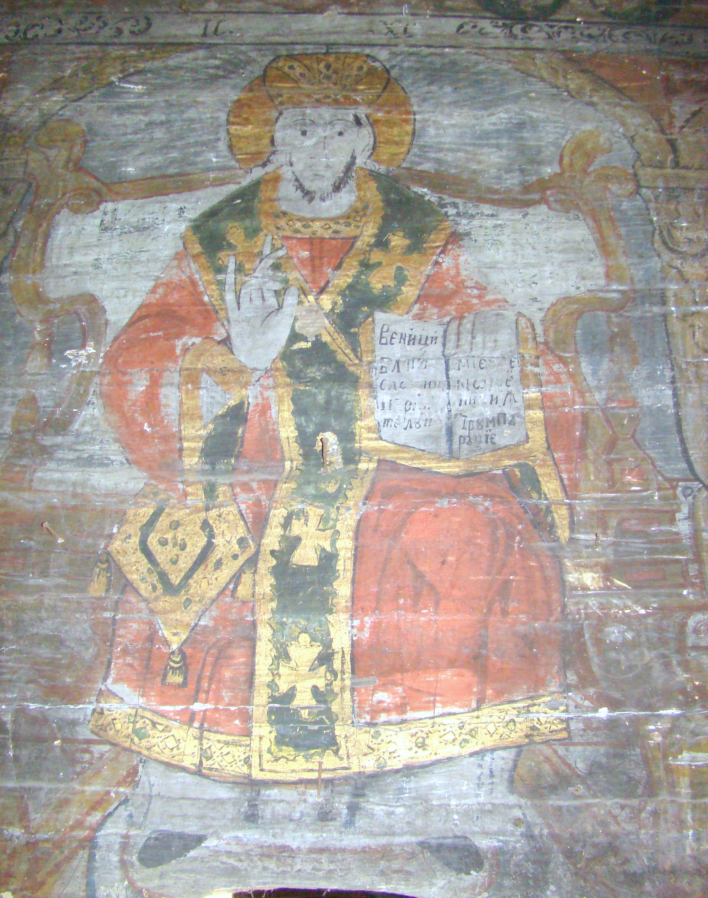 Biserica de lemn din Apahida, județul Cluj